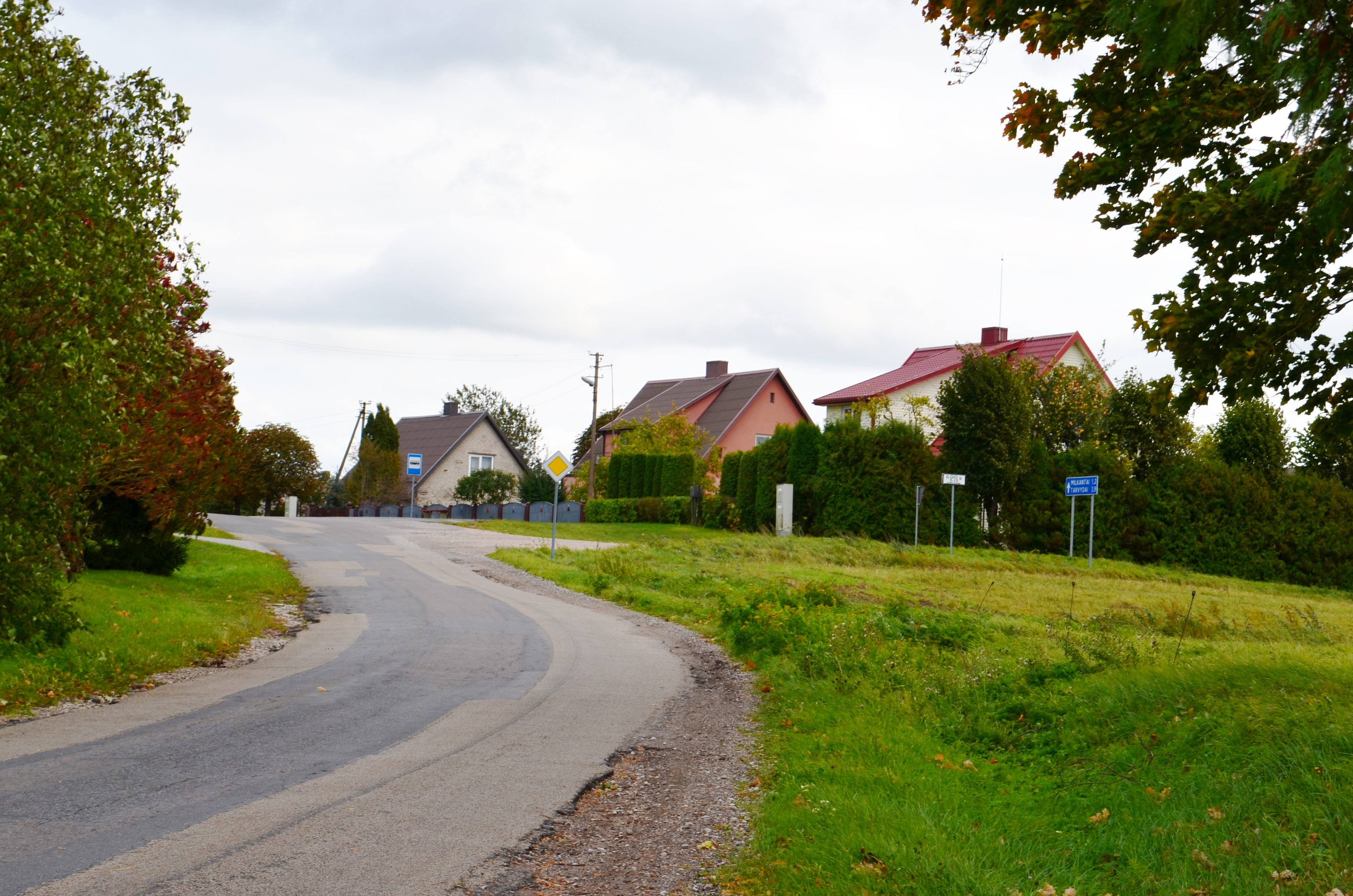 Kegai, Telšių raj.